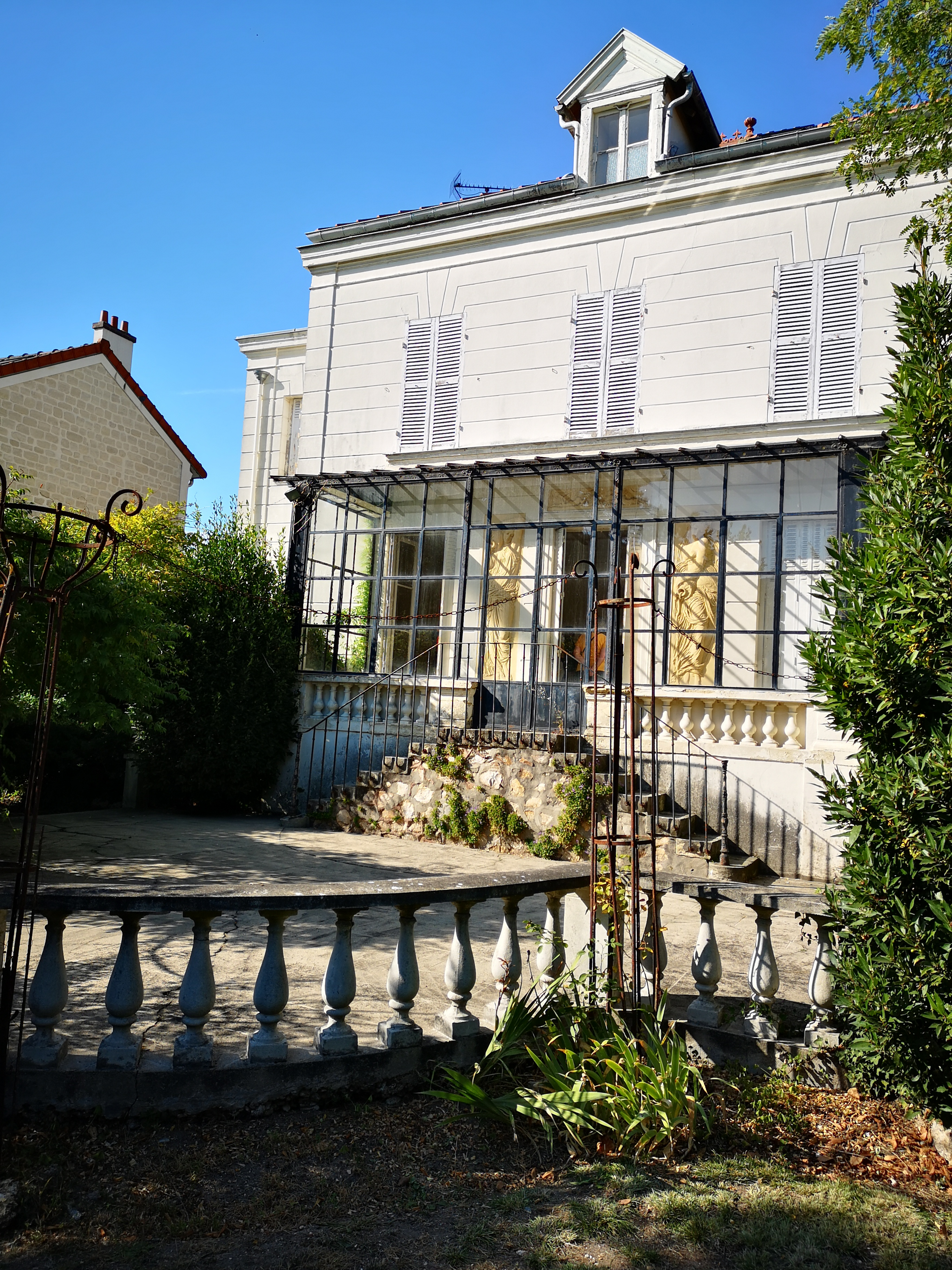 Façade arrière de la maison habitée par Victor Schœlcher à Houilles, dans les dernières années de sa vie